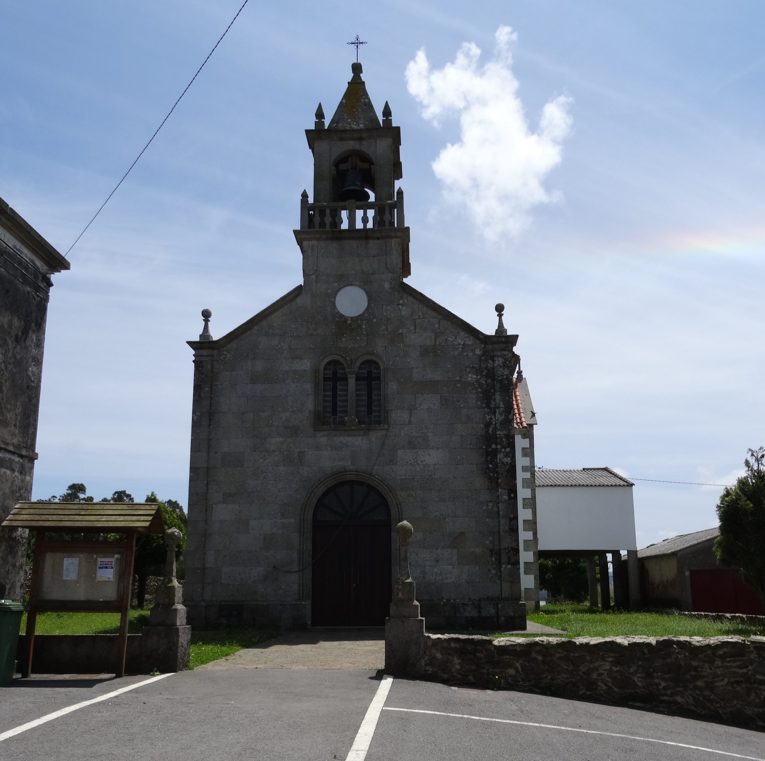 Igrexa de San Salvador de Pazos, Ponteceso.